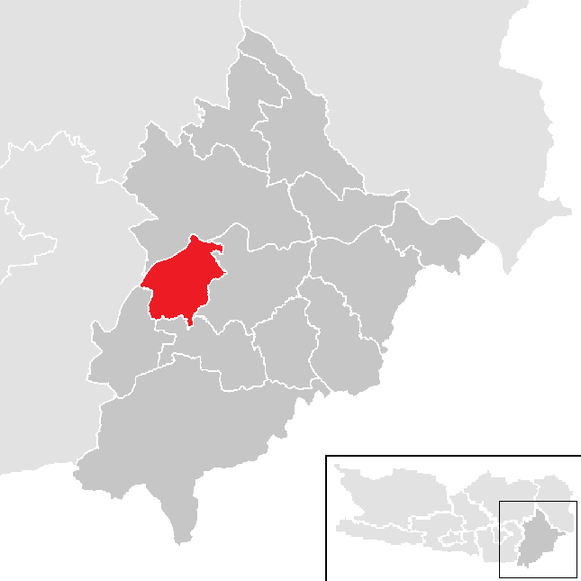 Bezirk Völkermarkt